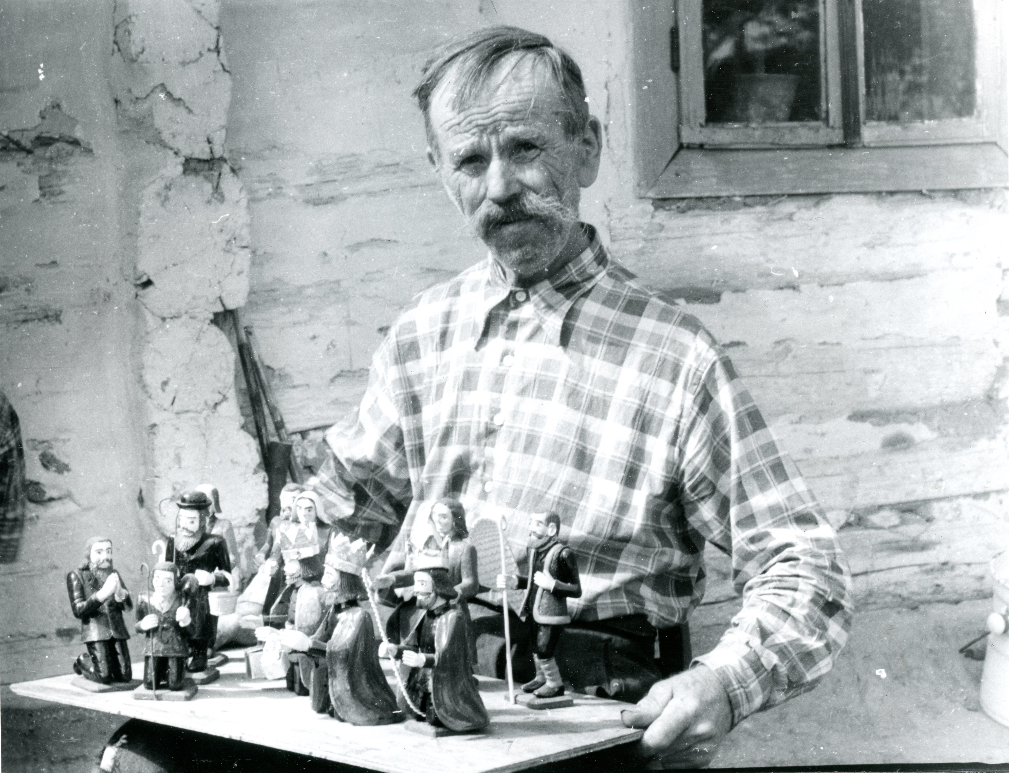 Antoni Lasek rzeźbiarz z Humnisk pozujący ze swoją szopką.